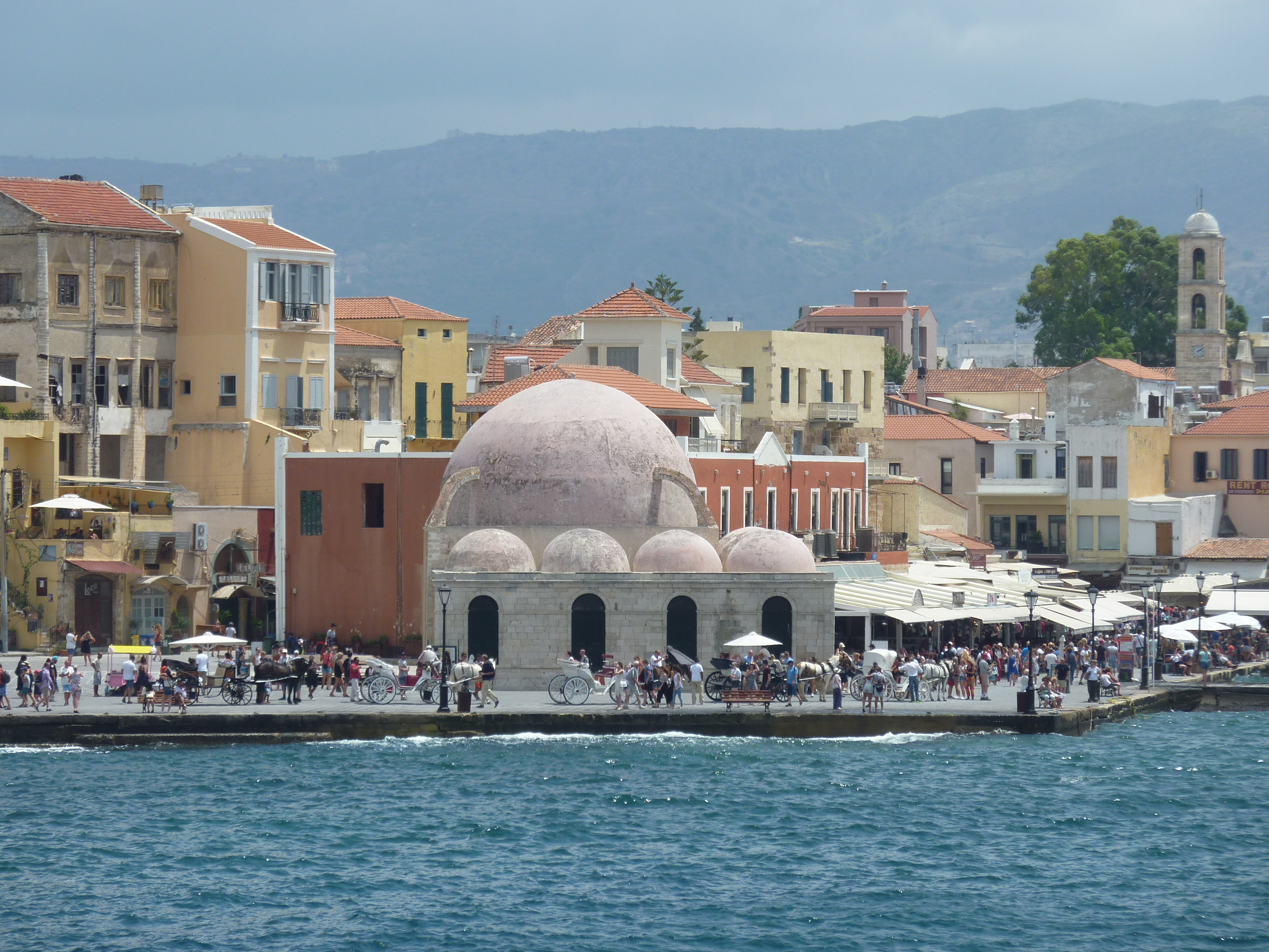 Τζαμί παρά τον λιμένα, οδός Τομπάζη (Γυαλί Τζαμί)«Τζαμί παρά τον λιμένα, οδός Τομπάζη (Γυαλί Τζαμί)»